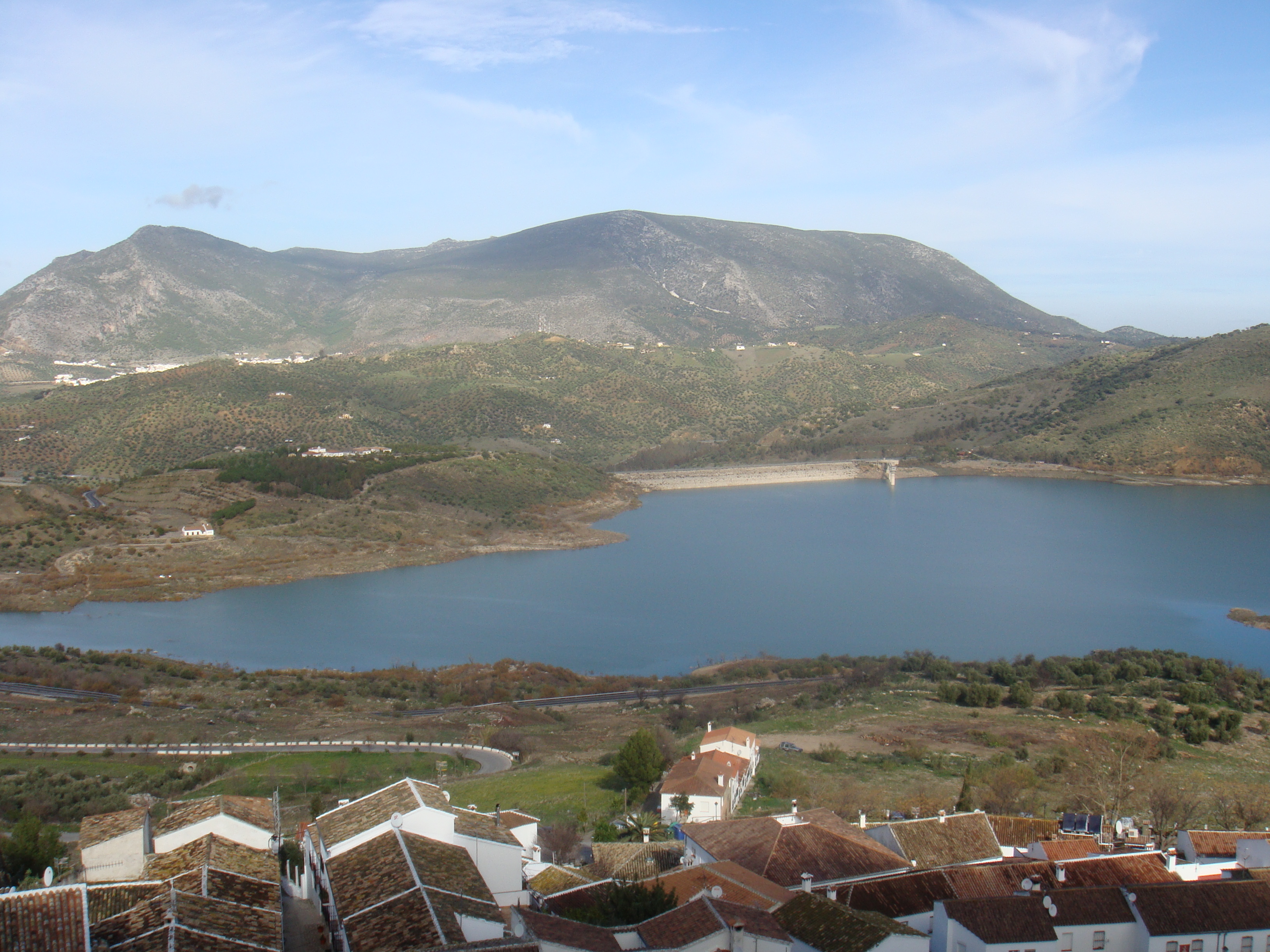 Emablse de Zahara de la Sierra con Algodonales al fondo